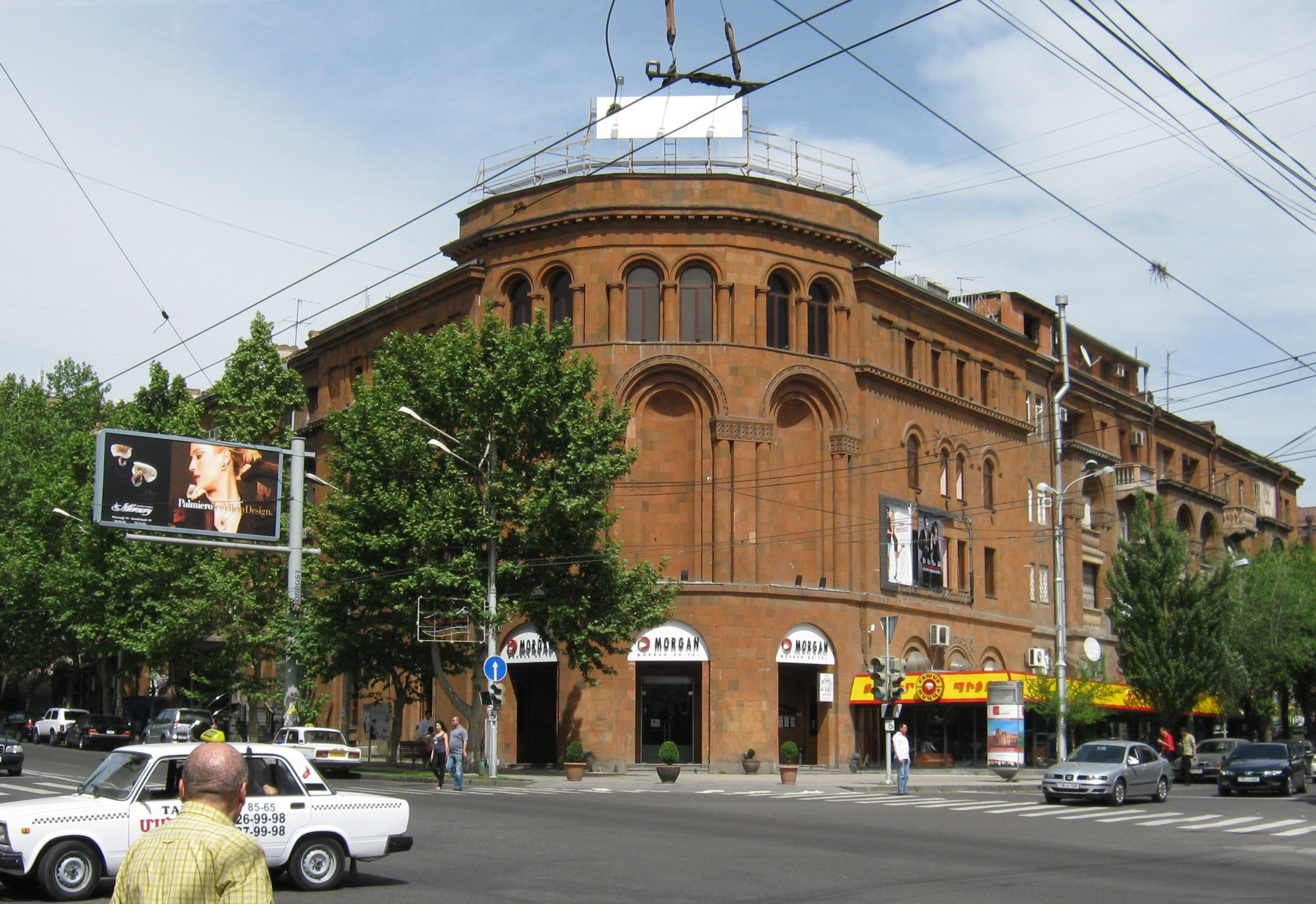 Кинотеатр Наири в Ереване.